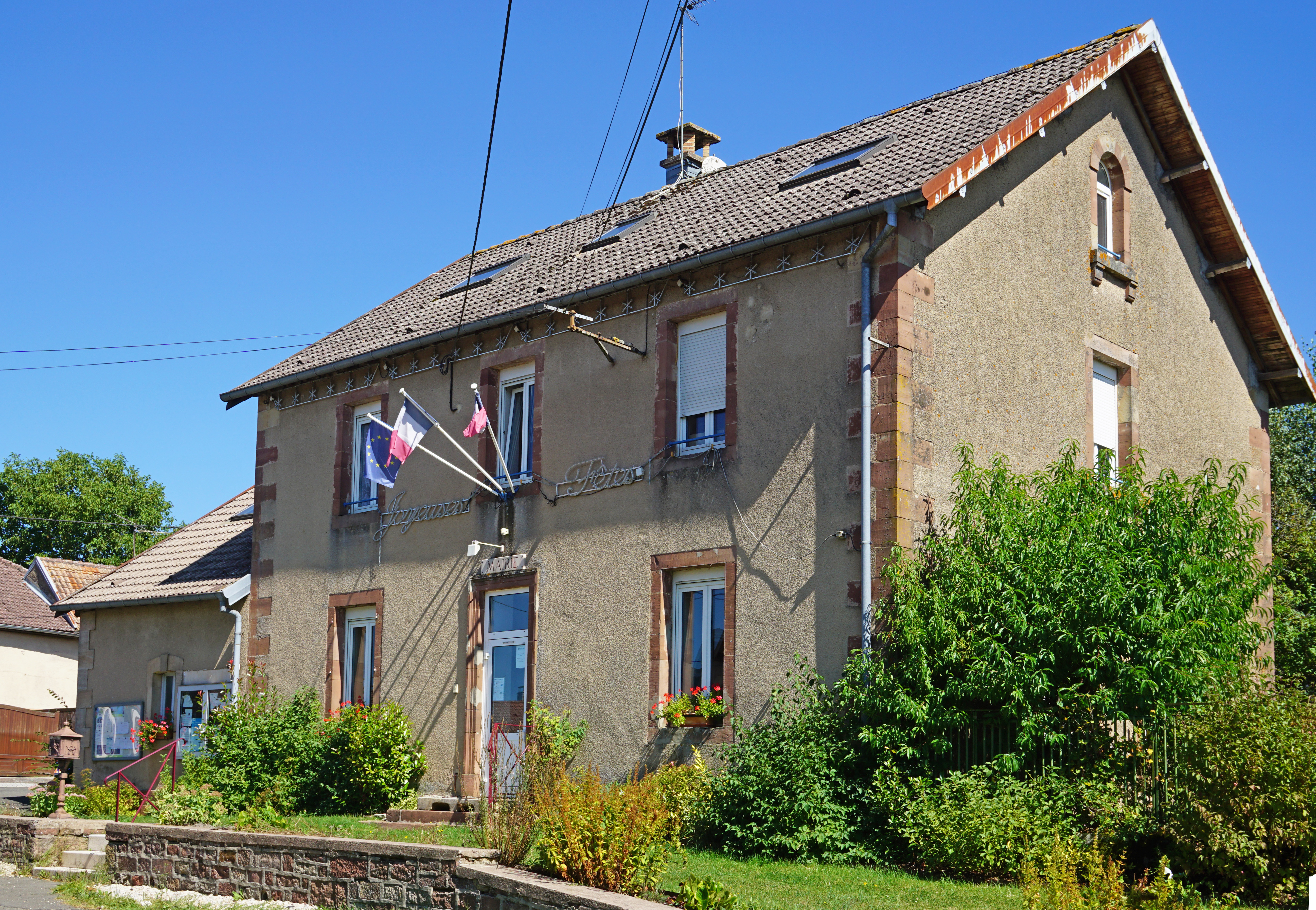 Mairie de Villers-sur-Saulnot.